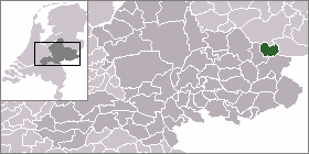 Locatie gemeente Neede. Afbeelding gemaakt door gebruiker:Mtcv en vrij te gebruiken.